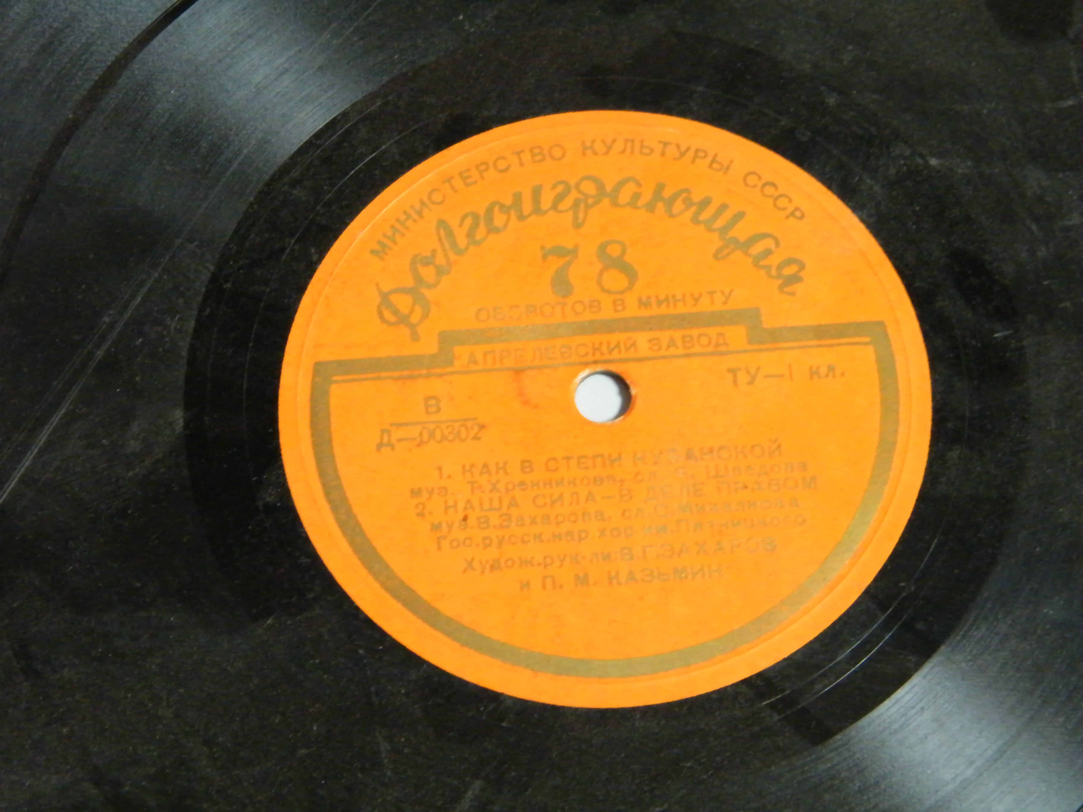 Теплый ламповый звук